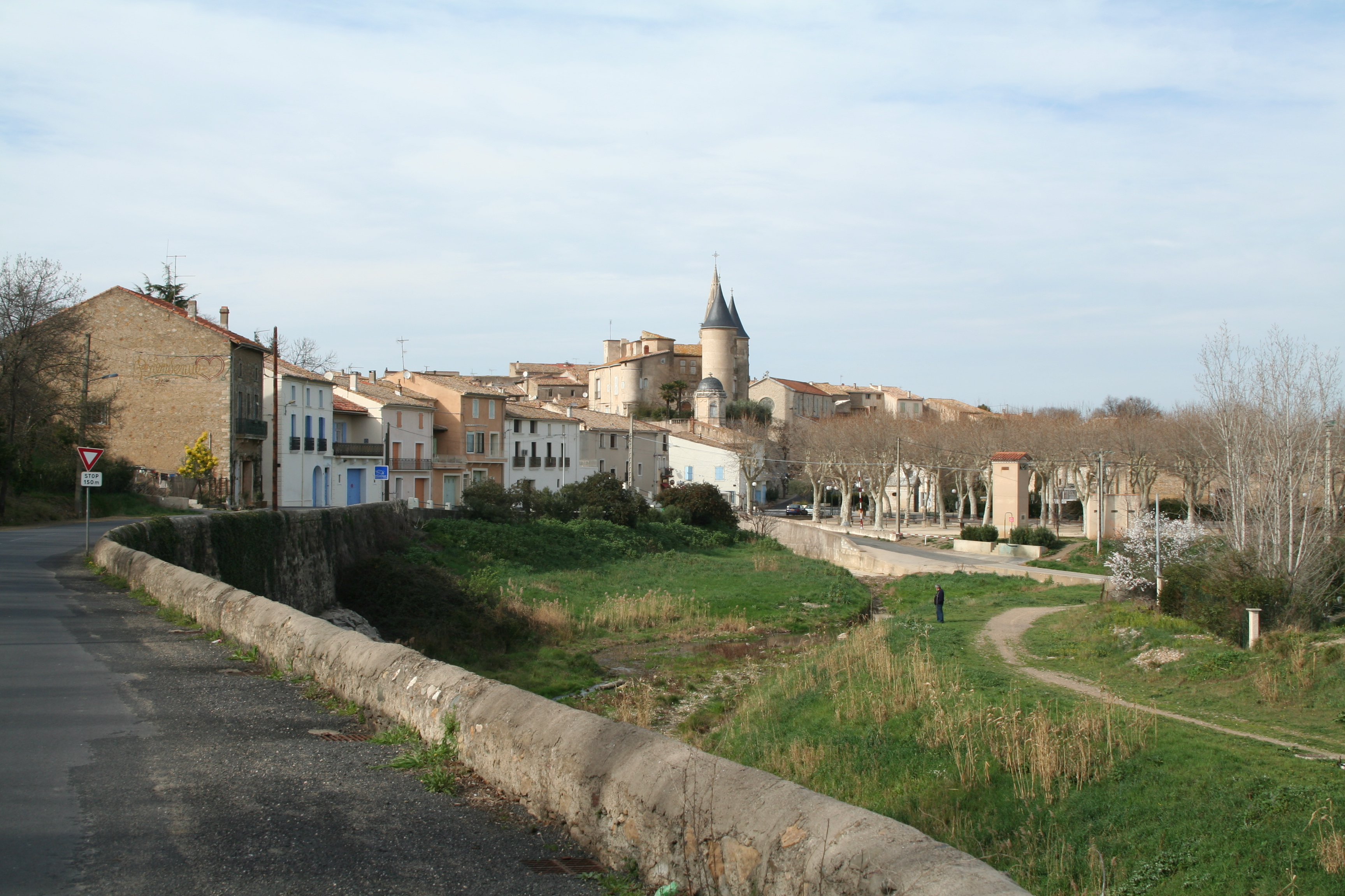 Pouzolles (Hérault) - vue générale.